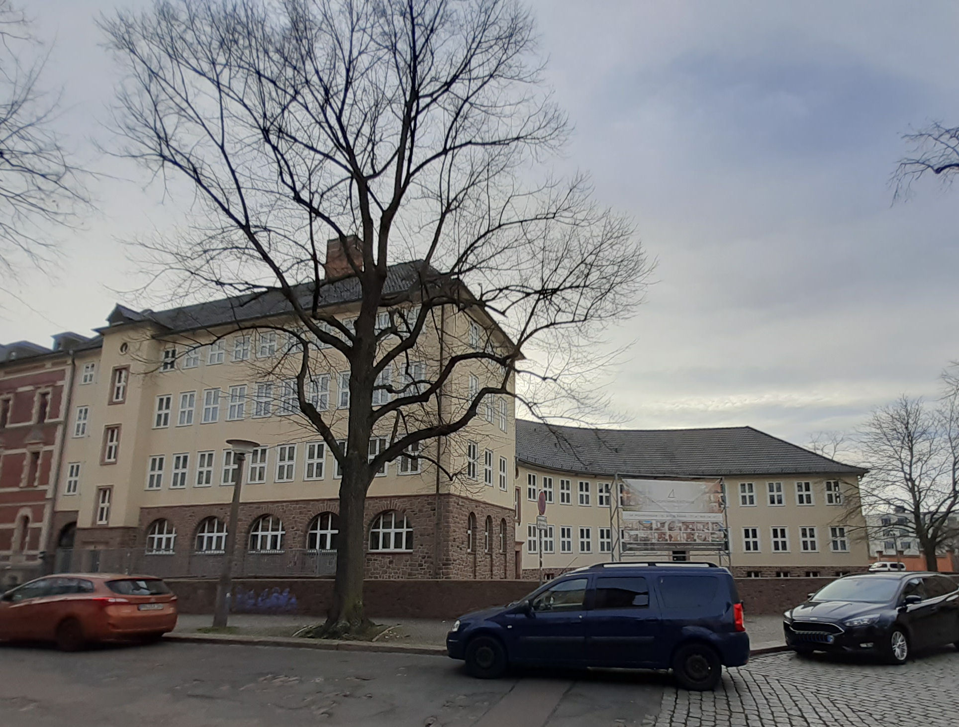 Schopenhauerstraße 4, Halle (Saale)